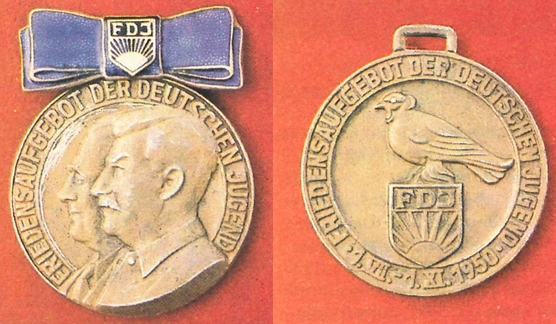 Friedensmedaille der FDJ